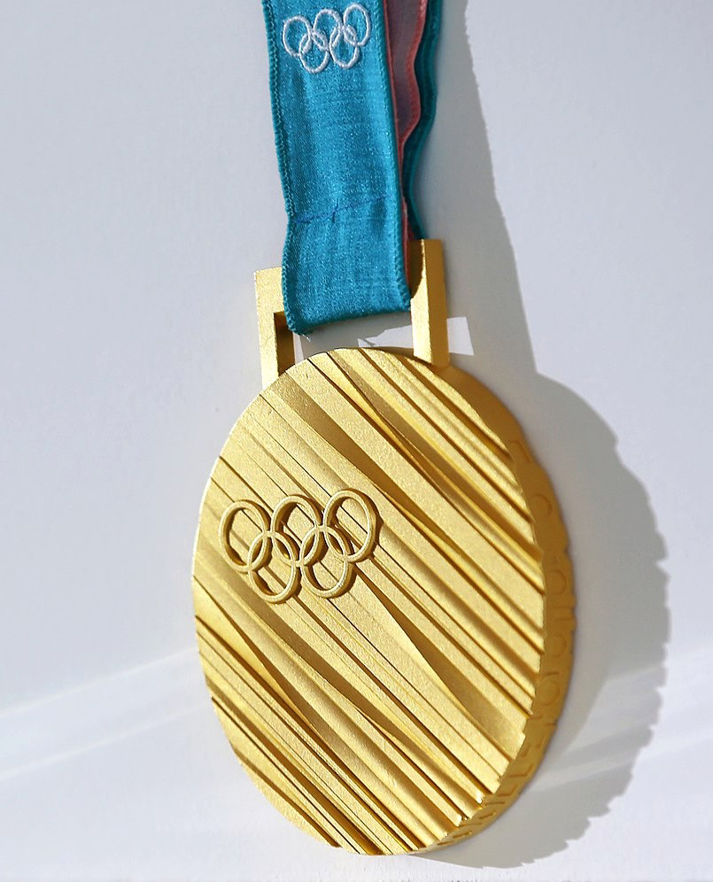 Золотая медаль зимних Олимпийских игр 2018 в Пхёнчхане